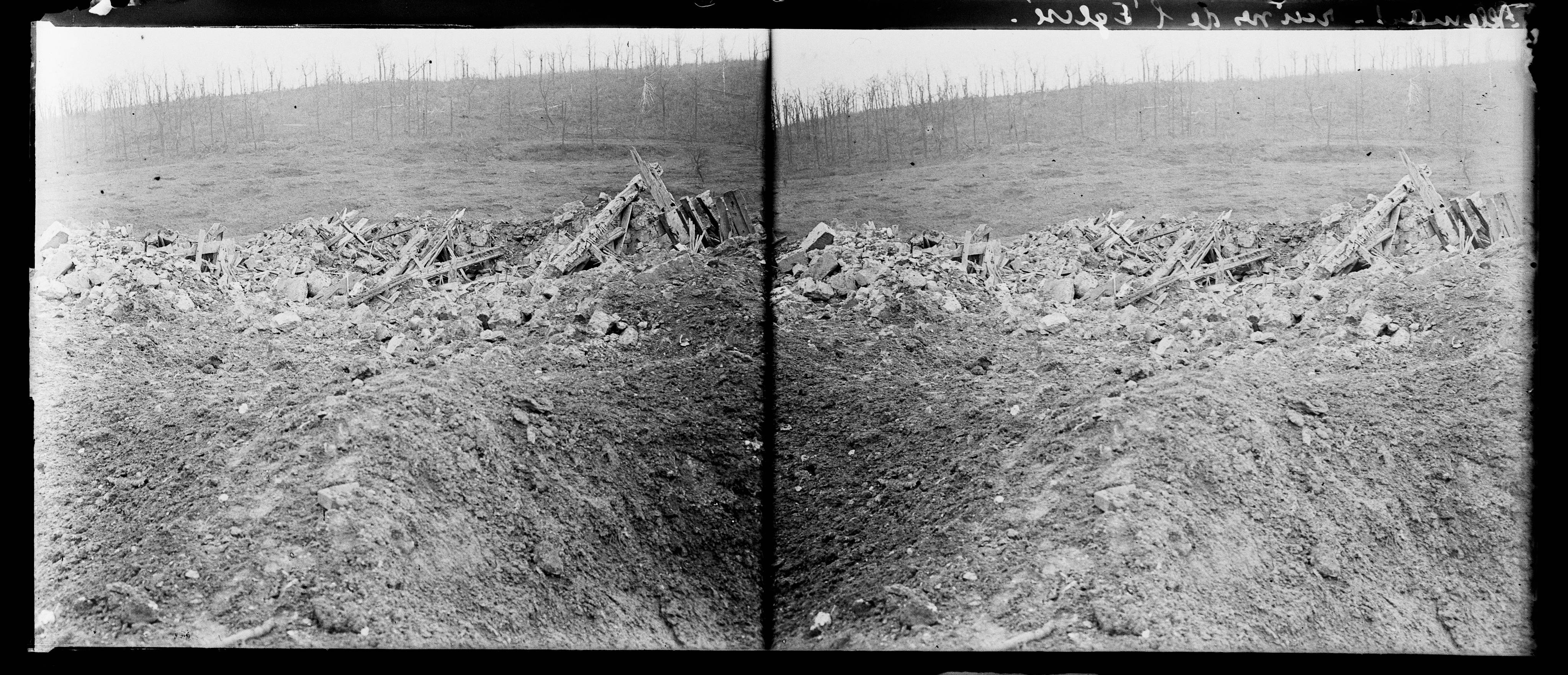 Amas de ruines et de gravats de l'église d'Allemant (Aisne) rasée par les bombes. 1918. Guerre 1914-1918.